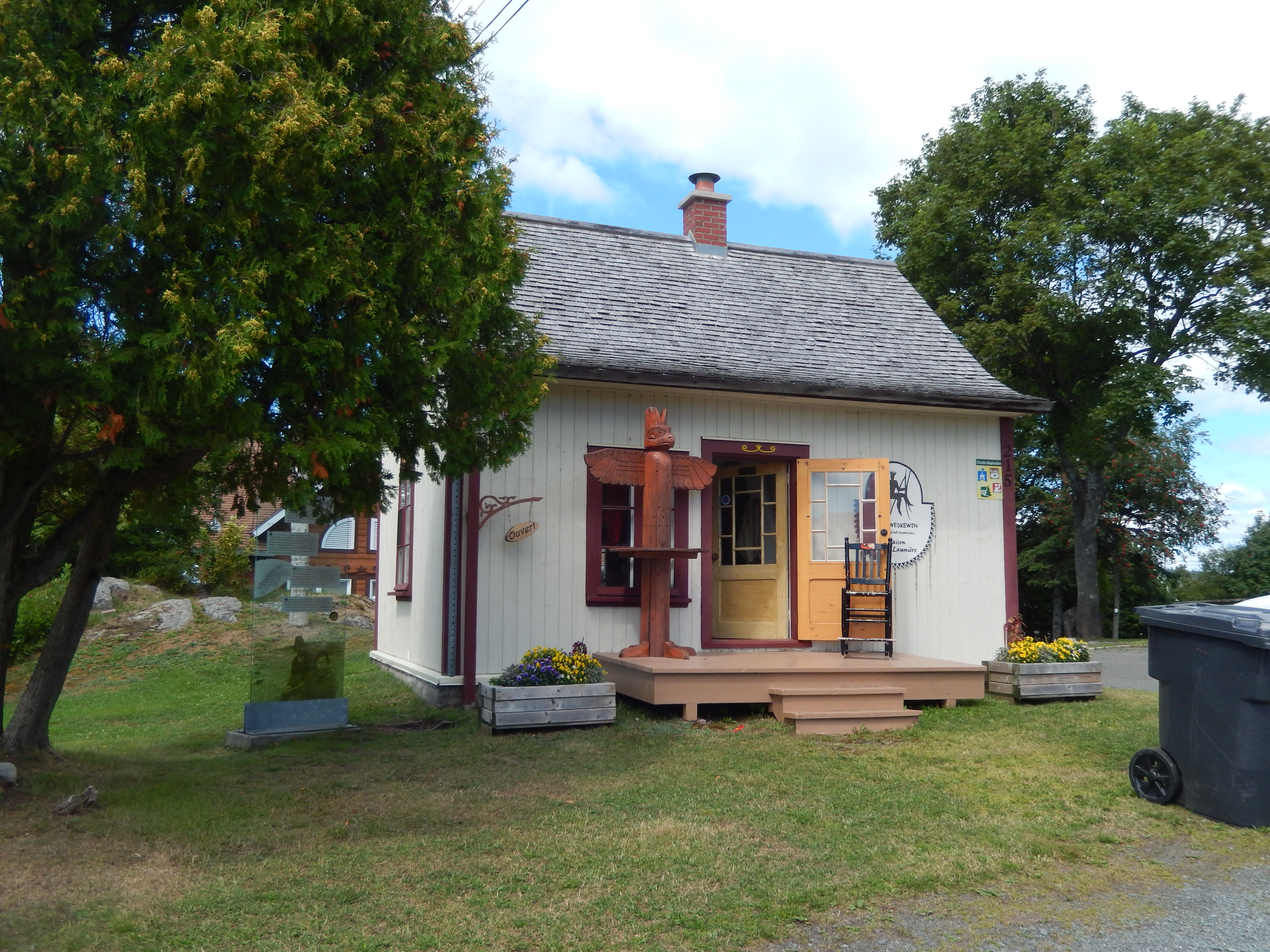 Cacouna (réserve indienne)